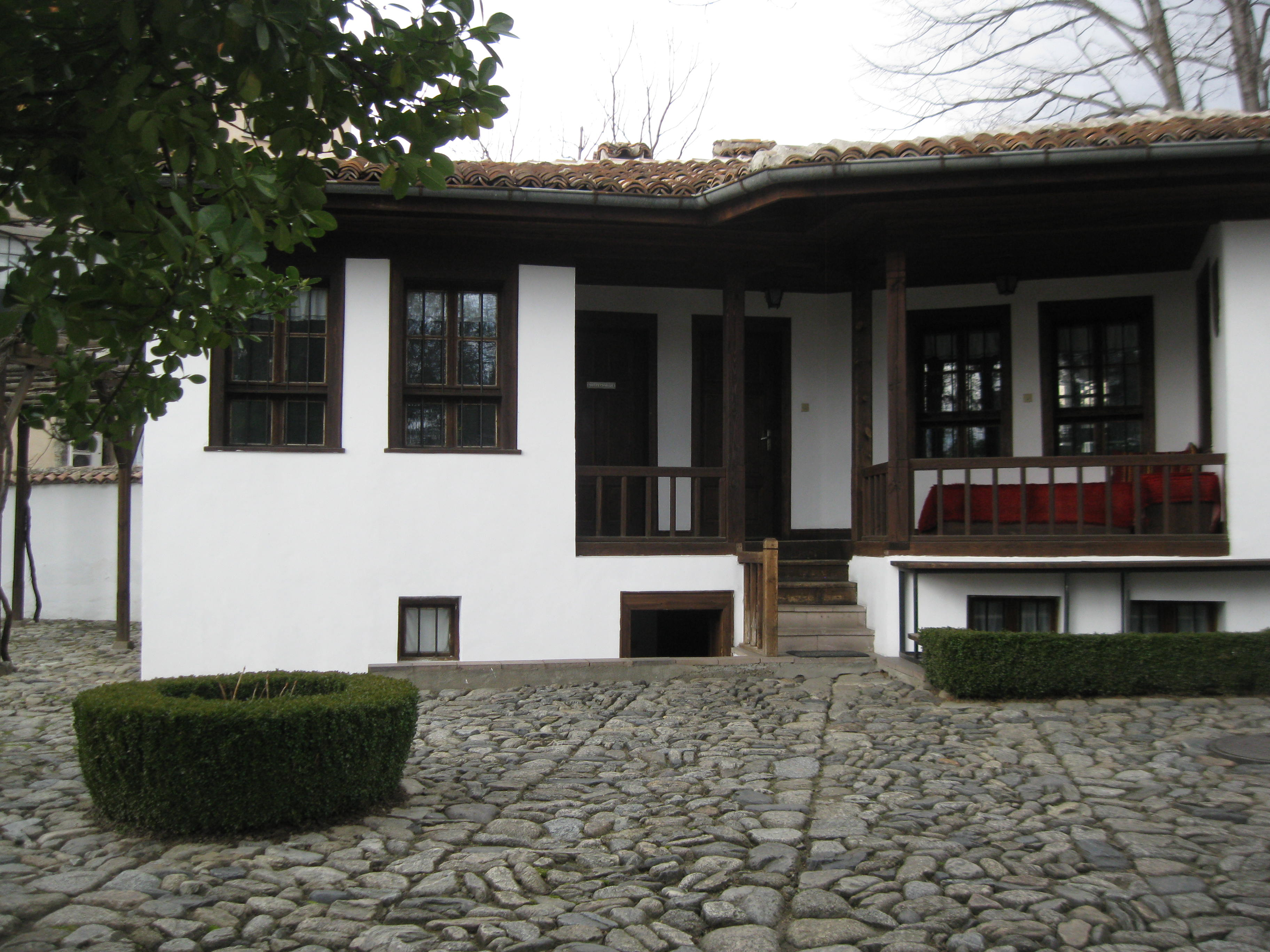 Национален музей „Васил Левски”, Карлово